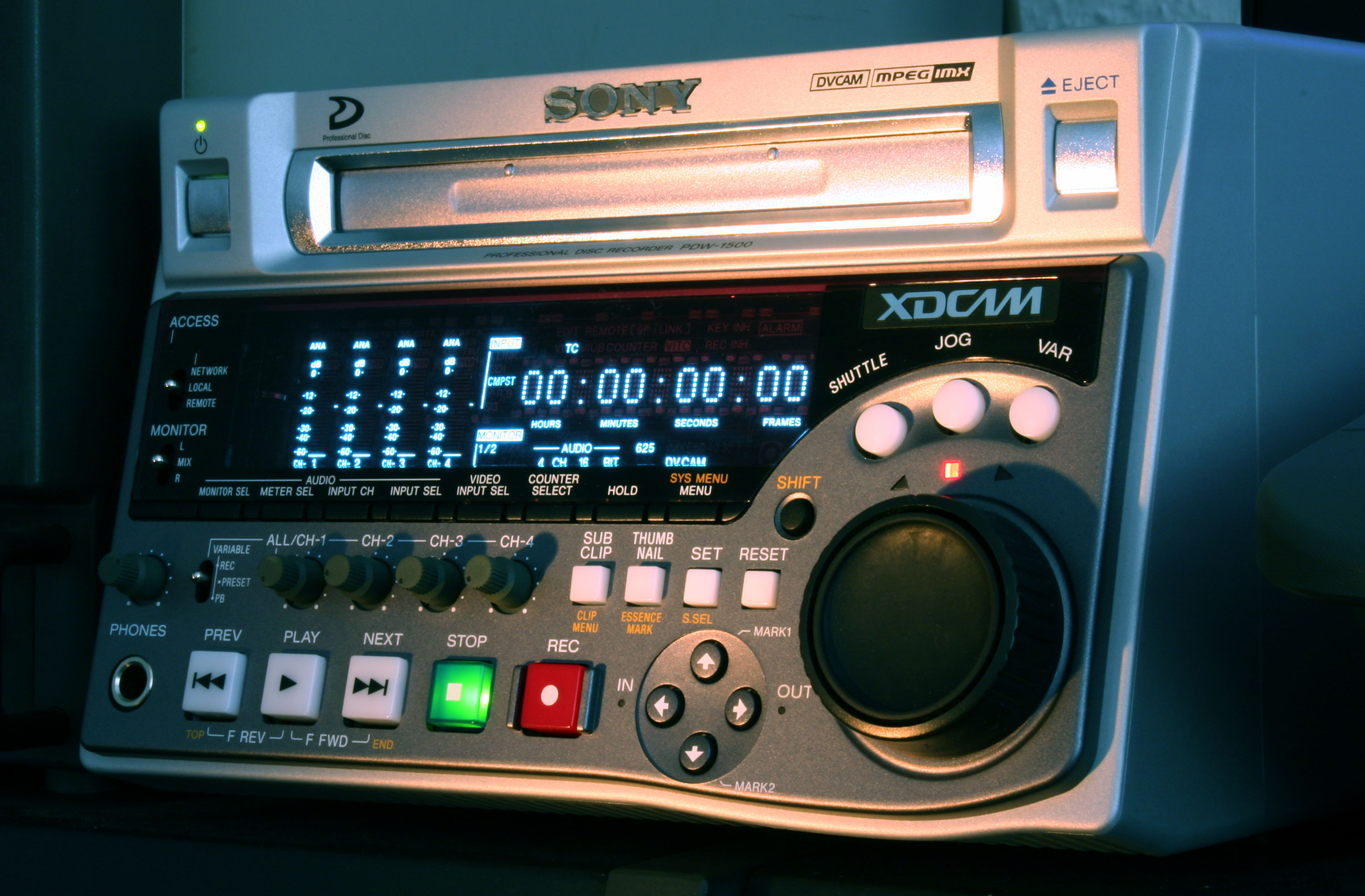 Eine XDCAM PDW-1500 Maz der Firma ANC-NEWS